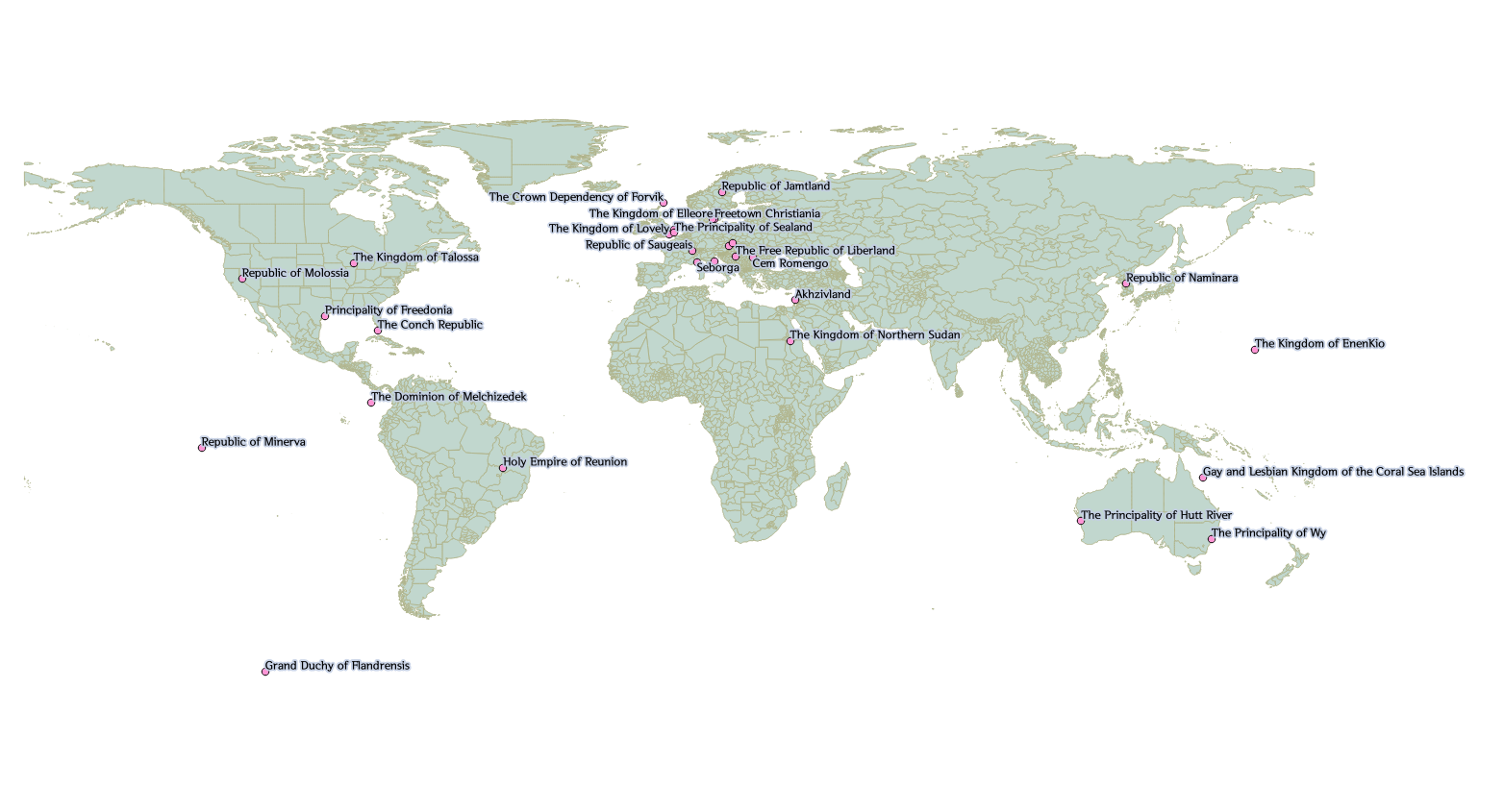 유럽, 아메리카, 오세아니아를 중심으로 마이크로네이션을 표시하였다. 기본 지도는 QGIS의 파일을 사용하였다.